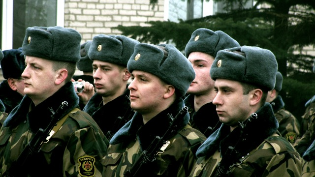 Беларуская (тарашкевіца): Франак Вячорка падчас вайсковай прысягі ў Баранавічах у студзені 2009